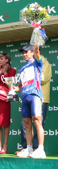 Eladio JIMENEZ (Comunidad Valenciana) Lider de la General. - Eladio JIMENEZ (Comunidad Valenciana) Sailkapen orokorraren liderra. Winner Euskal Bizikleta 2005